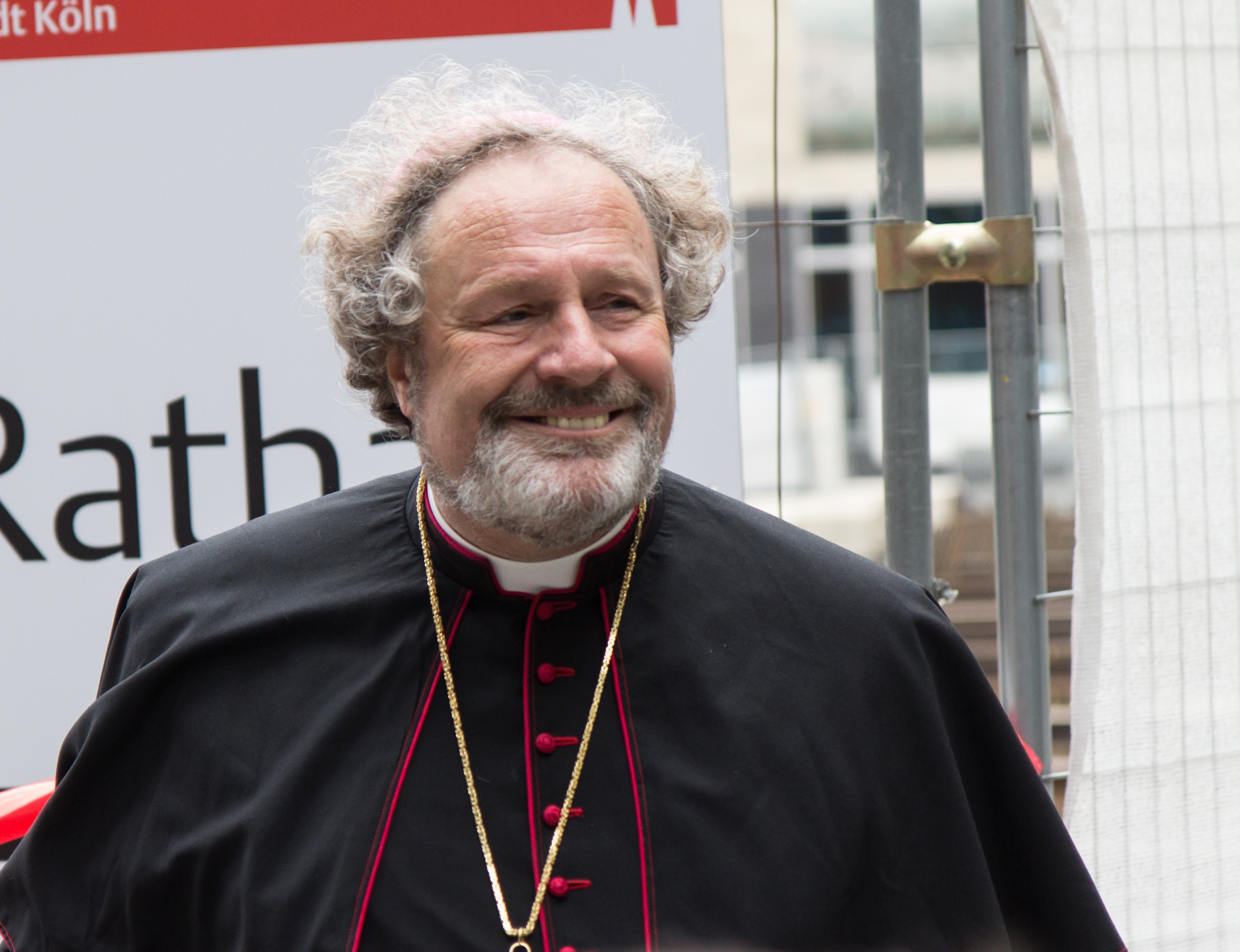 Besuch des Bundespräsidenten Frank-Walter Steinmeier und seiner Ehefrau Elke Büdenbender am 24. Juni 2017 in Köln, anlässlich des gemeinsamen Festakts und eines Benefizkonzertes zum 175-jährigen Bestehen des Zentral-Dombau-Vereins zu Köln und des Kölner Männer-Gesang-Vereins. Situationen im Freien, zwischen Besuch im Rathaus, Besuch im Dom und Konzertbesuch. Hier: Weihbischof Rolf Steinhäuser beim Verlassen des Rathauses.